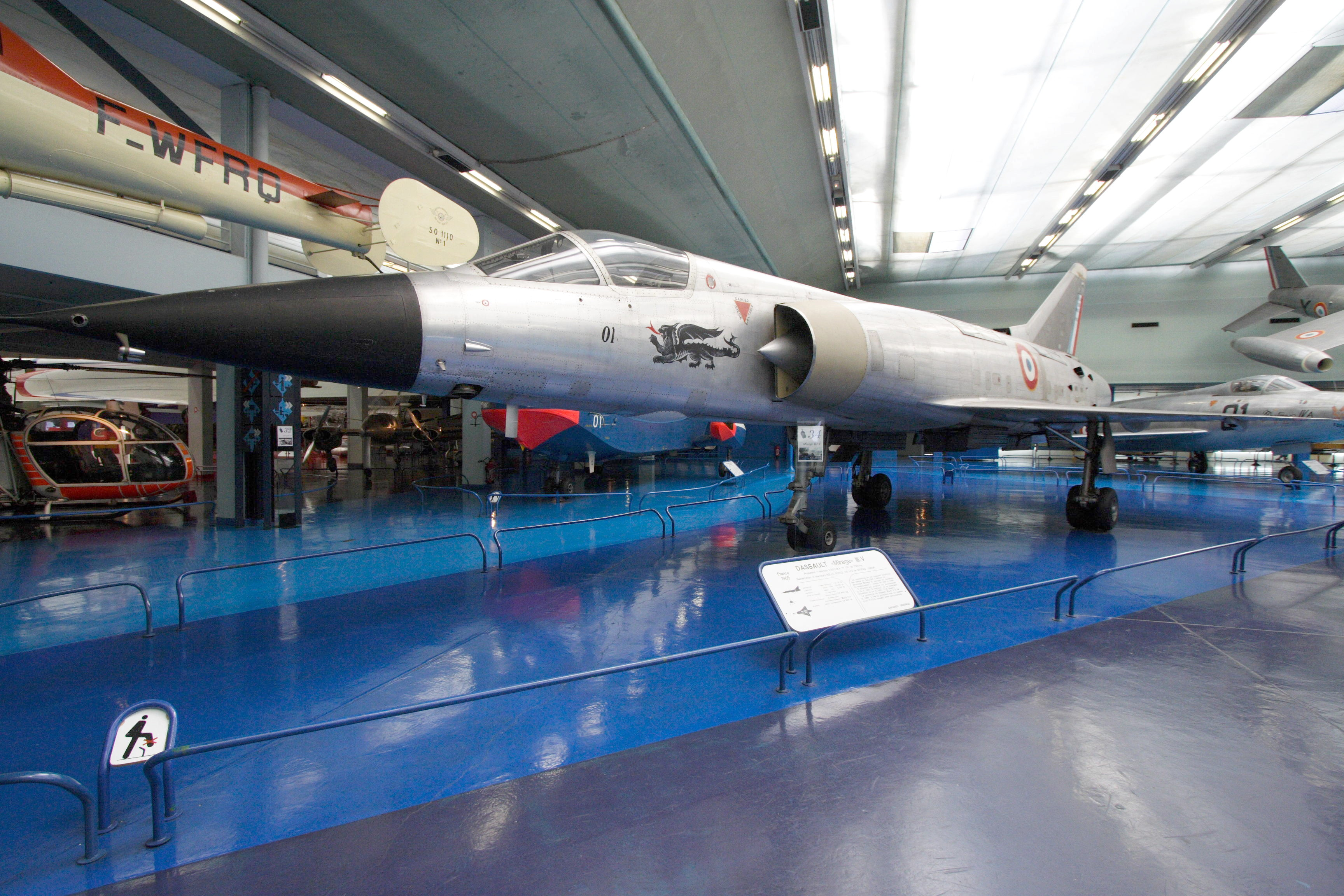 French experimental aircraft Mirage III.V (Musée de l'air et de l'espace, Le Bourget, France)